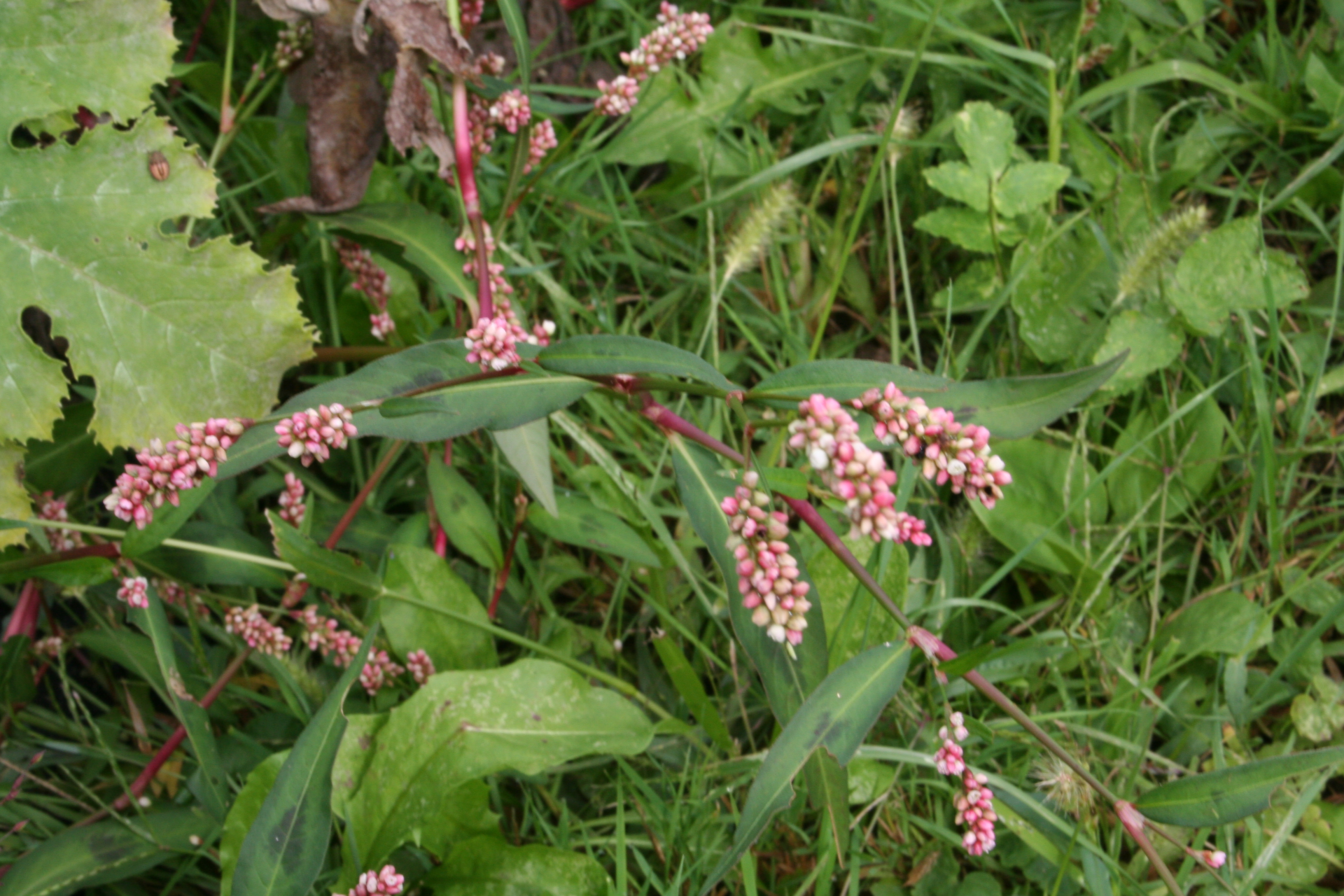 Persicaria_maculosa (sinonimo Polygonum persicaria) Località Villa Prima, Limana (BL), quota 350 m s.l.m.